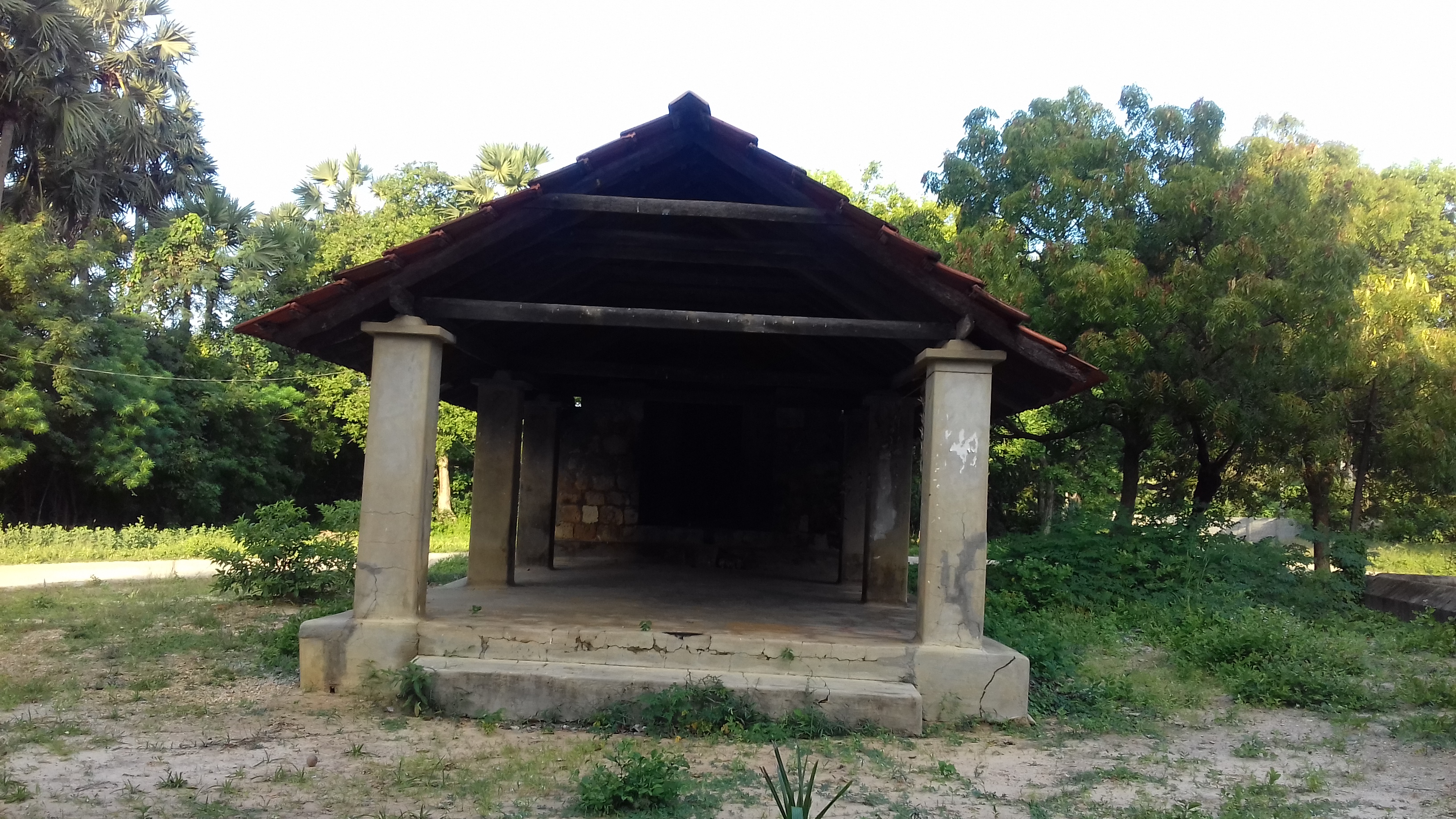 அராலி ஸ்ரீ விசாலாக்ஷி சமேத விஸ்வநாதேஸ்வரர் தேவஸ்தானம்